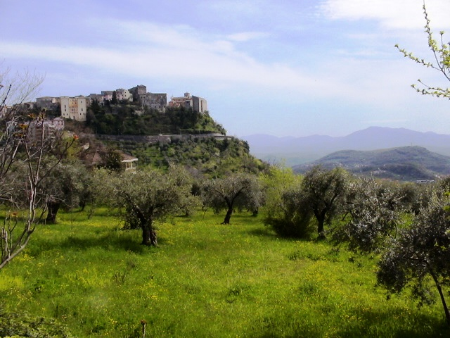 Veroli panorama